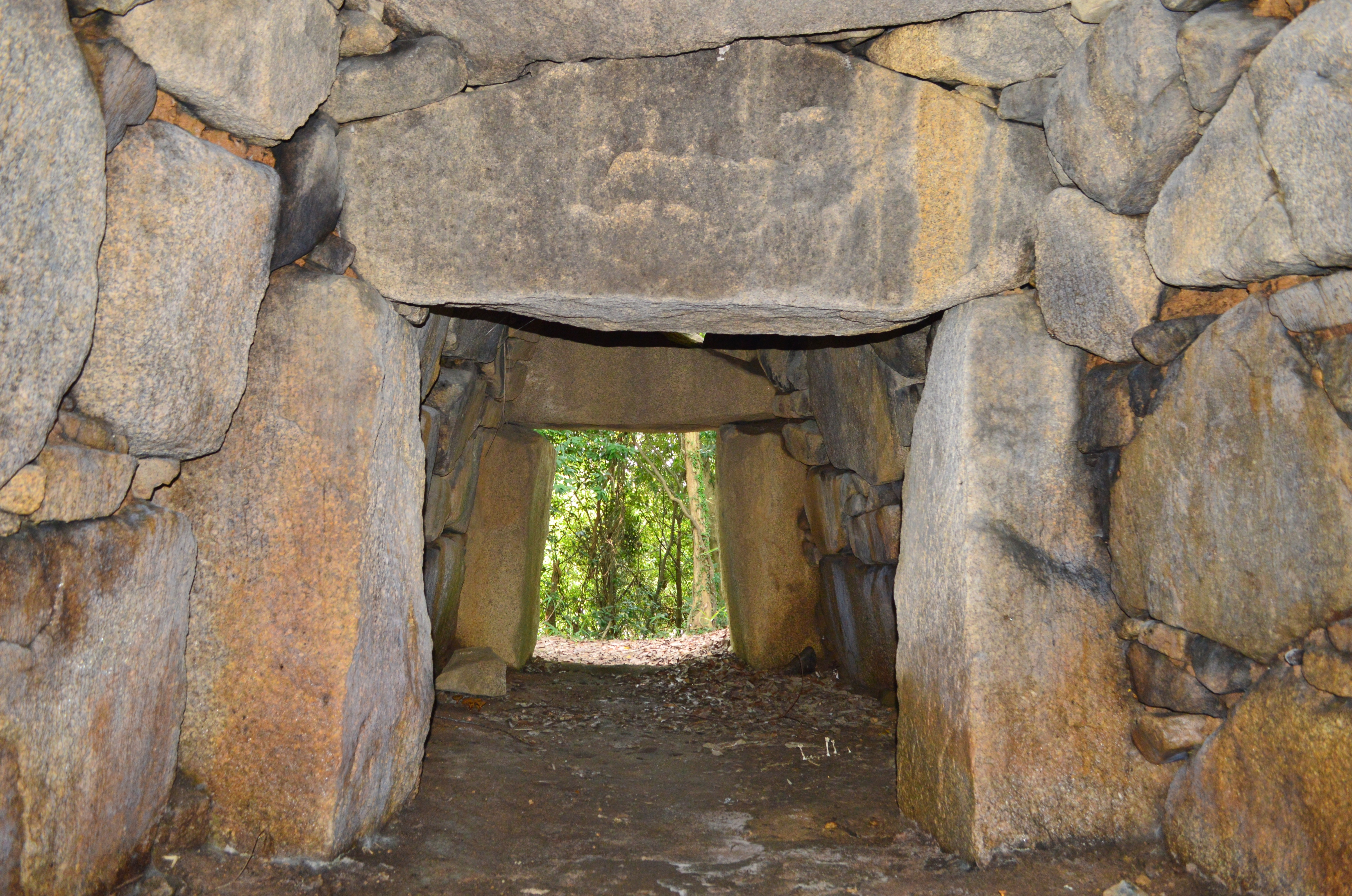 池田1号墳 (豊田市) 石室奥室